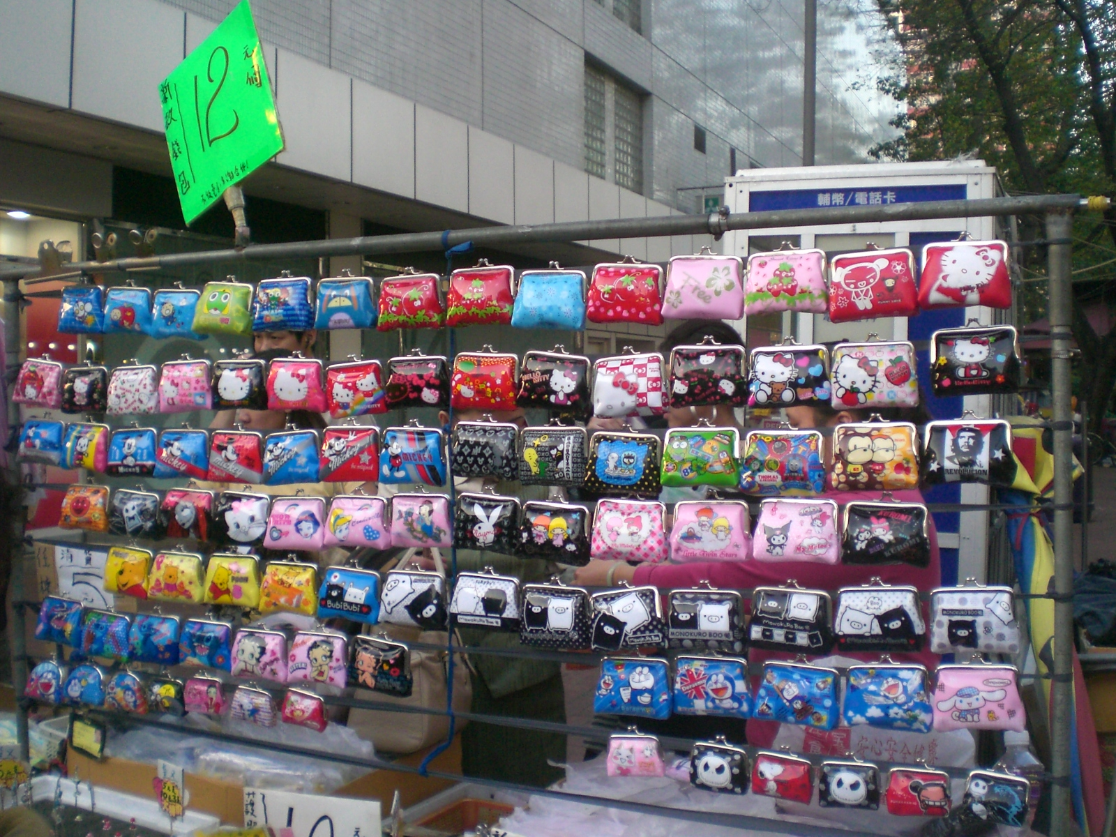 小女孩子的時尚銀包玩具